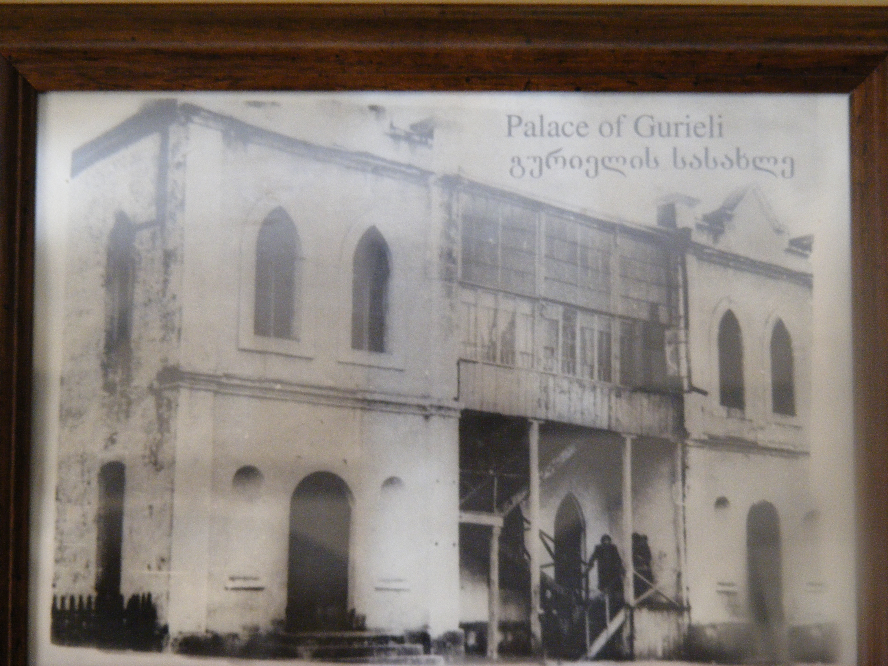 გურიელების სასახლე, ძველი ფოტონამუშევრის ფოტო.